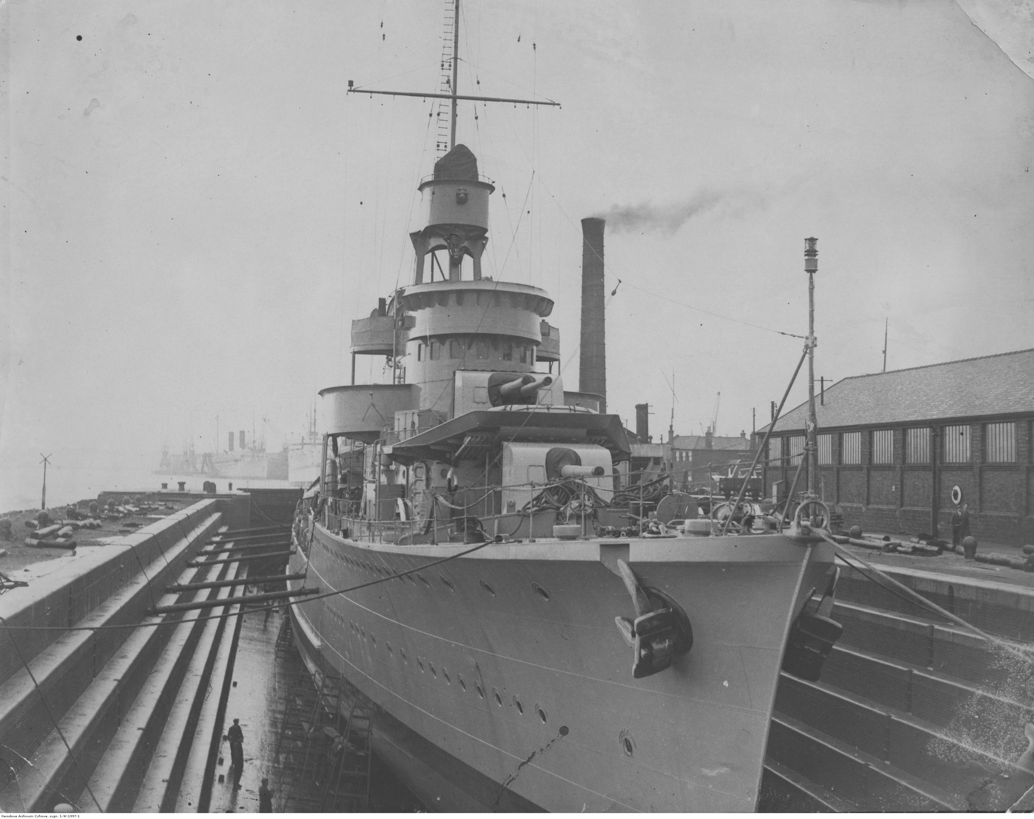 Niszczyciel ORP "Błyskawica" w doku wykończeniowym w Southampton.